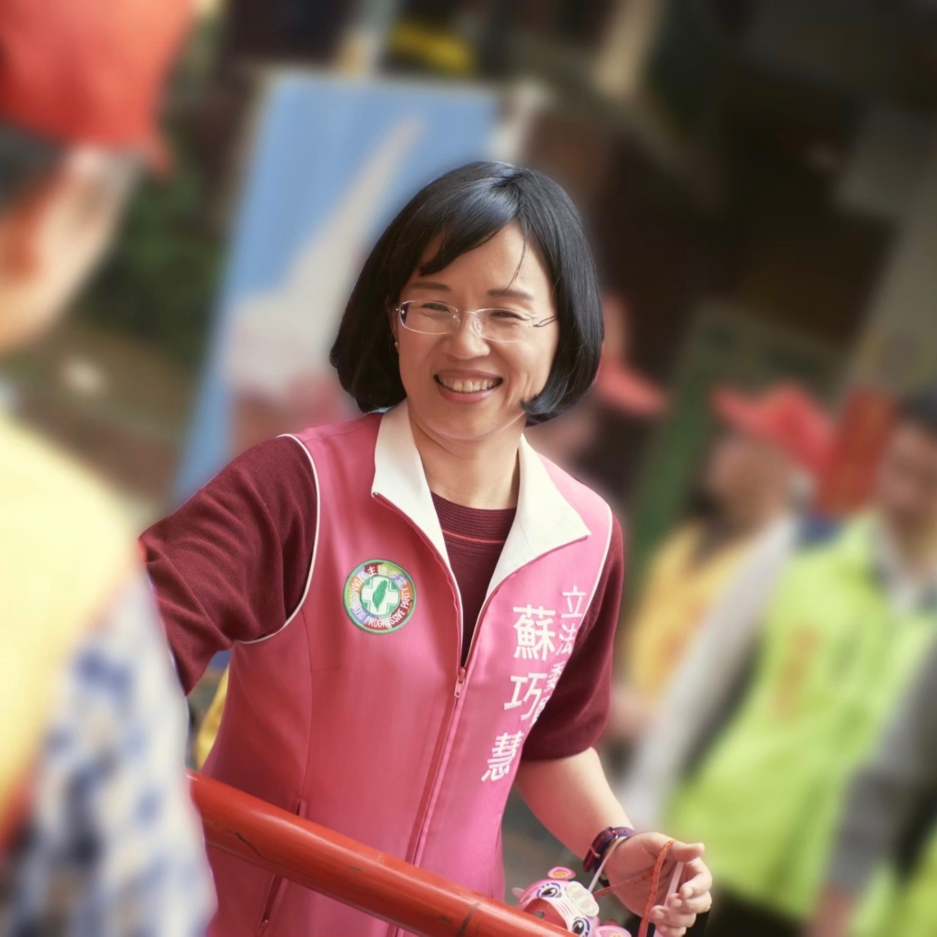 立法委員蘇巧慧2019年節期間參與鶯歌同慶里元宵遶境活動。